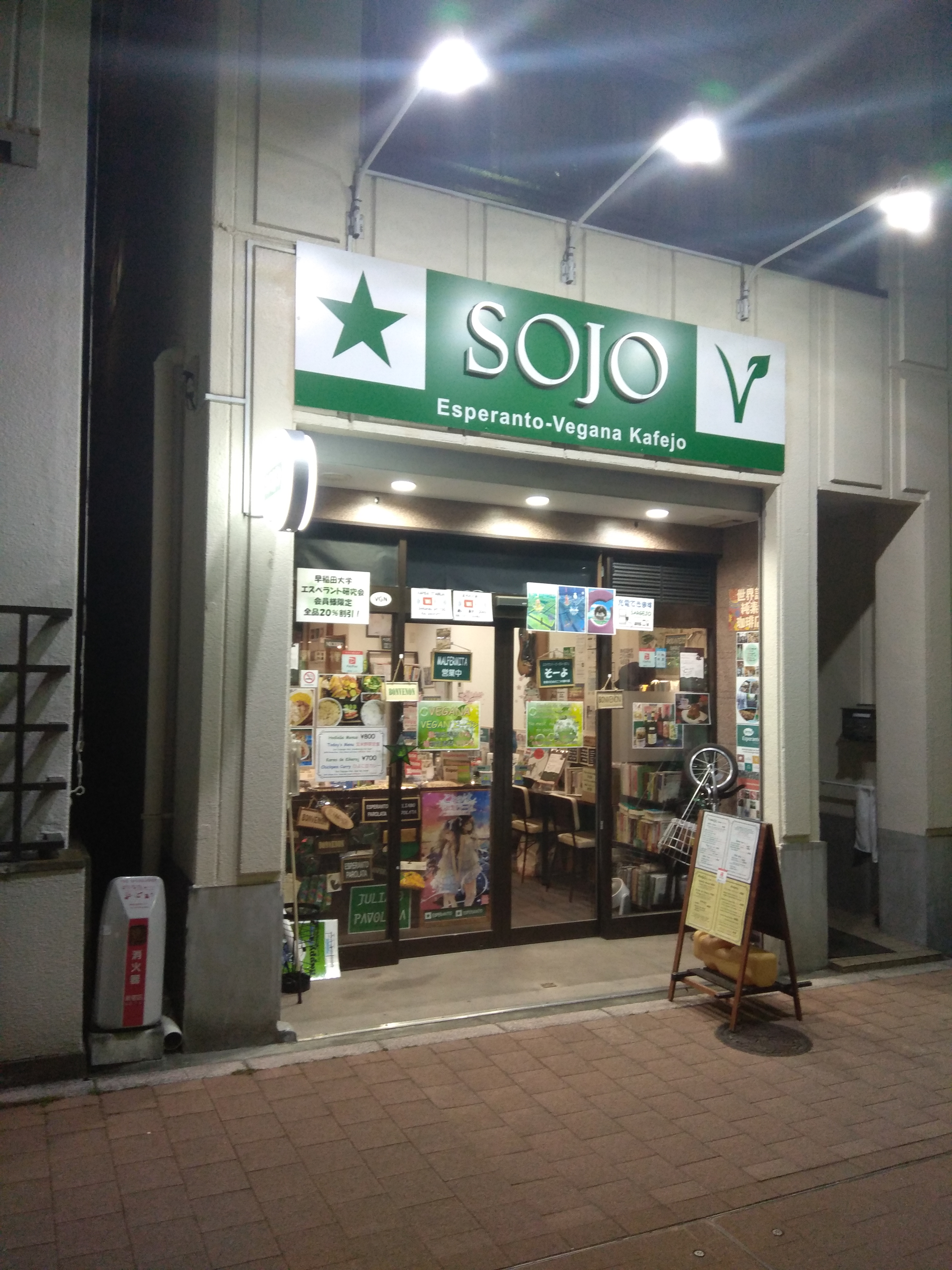 菜食食堂「sojo (ソーヨ)」（新宿区早稲田鶴巻町111）の外観